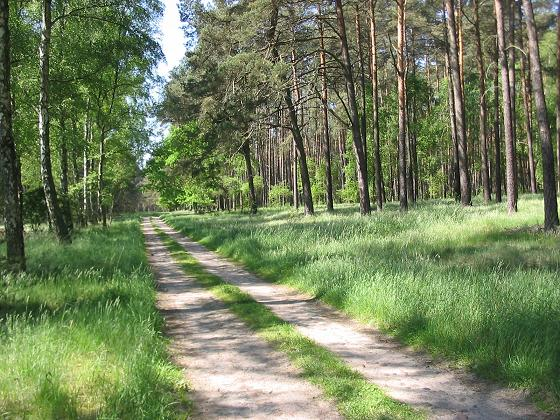 Waldlandschaft bei Stepenitz, Prignitz, Brandenburg fotografiert im Mai 2005 von Lienhard Schulz